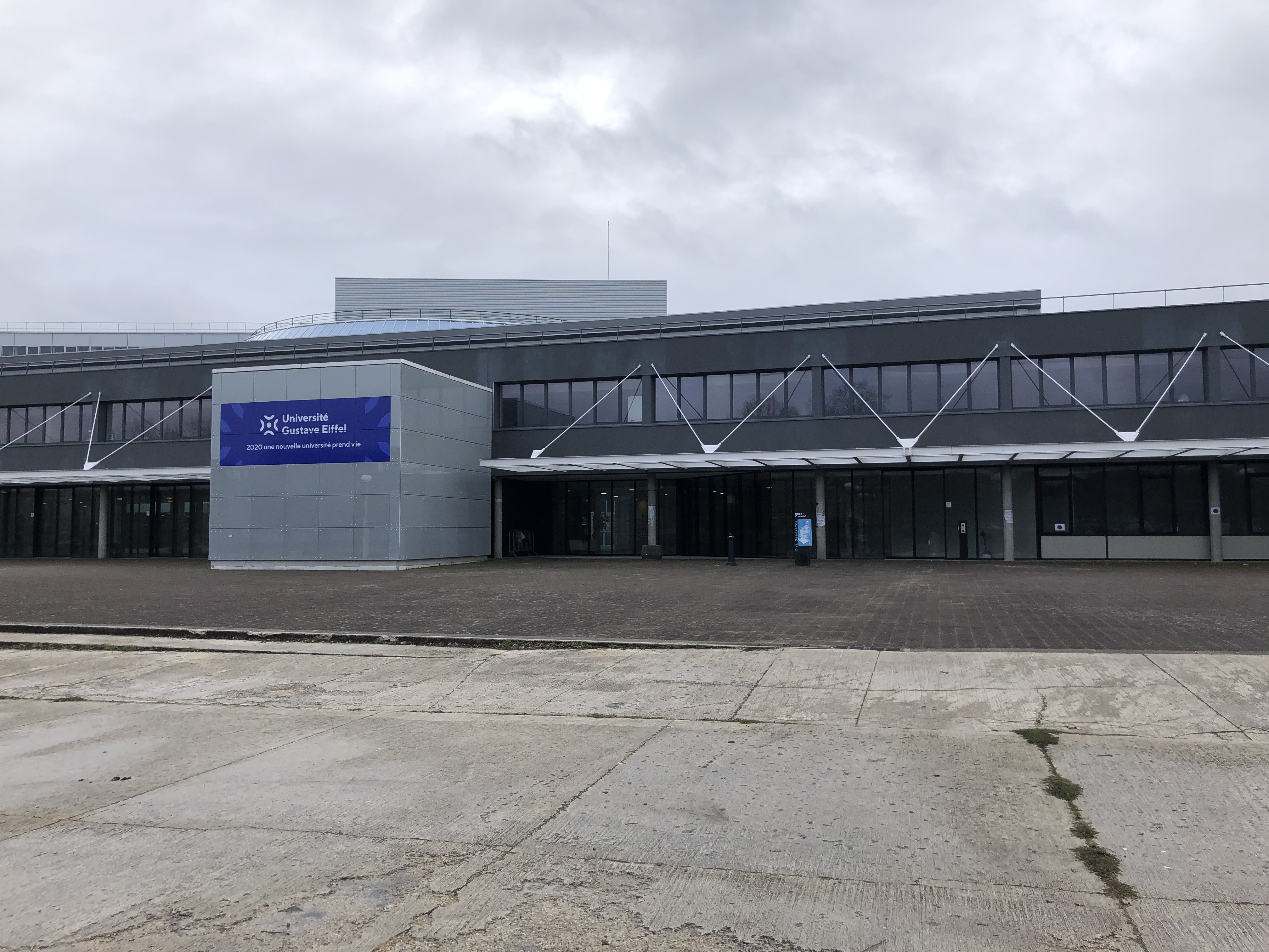 Bâtiment Copernic de l'UGE